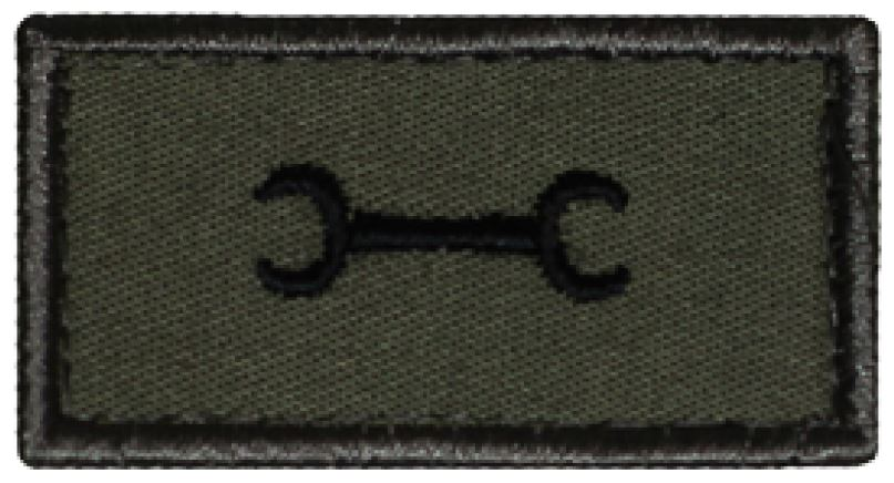 Anlagewart Abzeichen